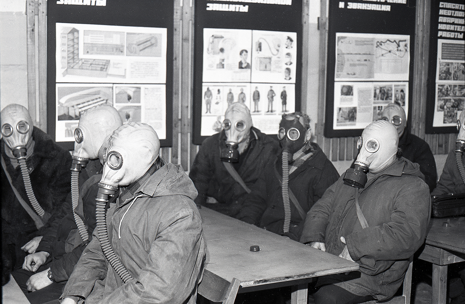 Gaasimaskide kasutamise õppused 74